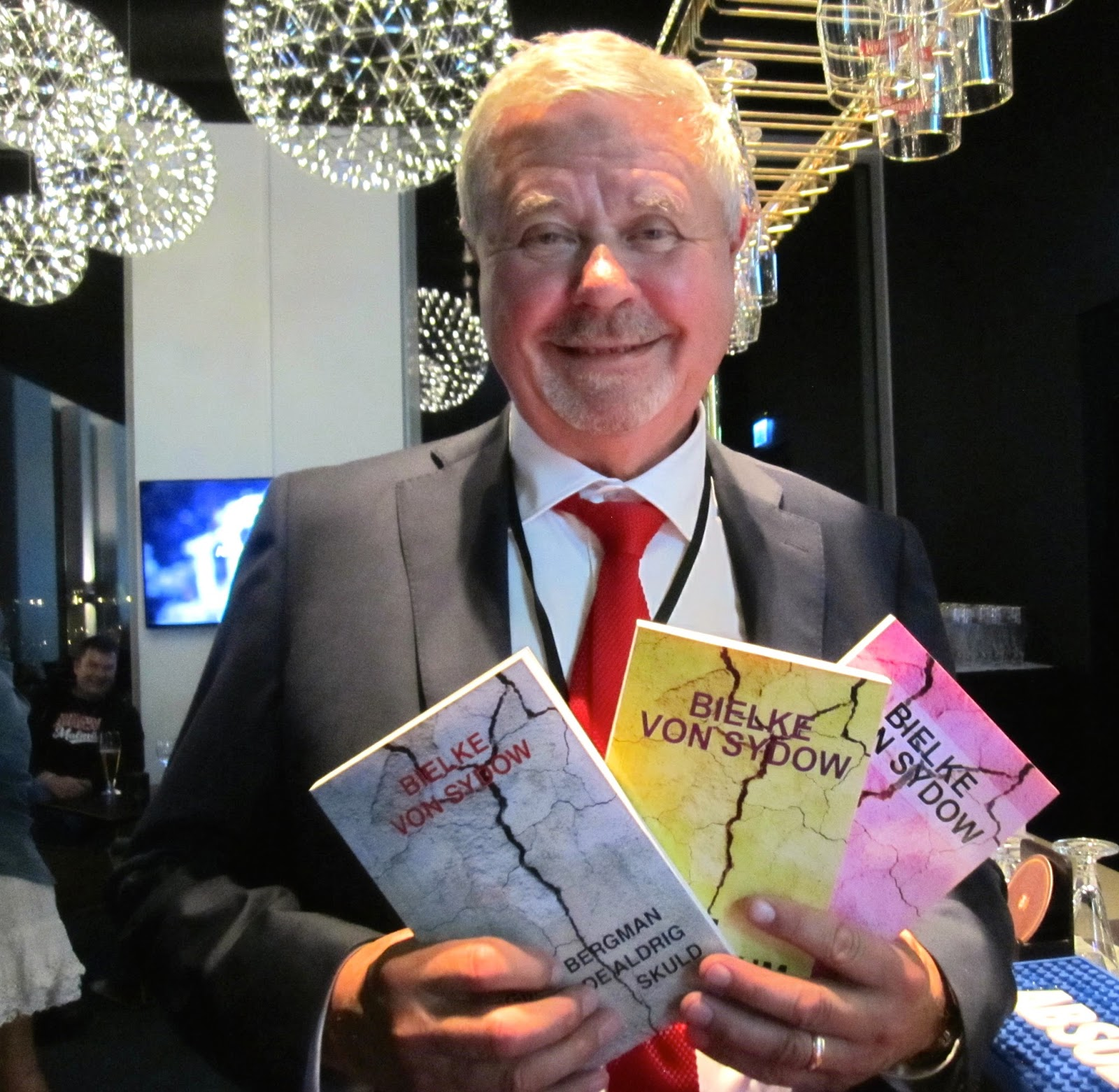 Entreprenören och företagsledaren Percy Nilsson. Fotot är taget 2016, under en galaceremoni.